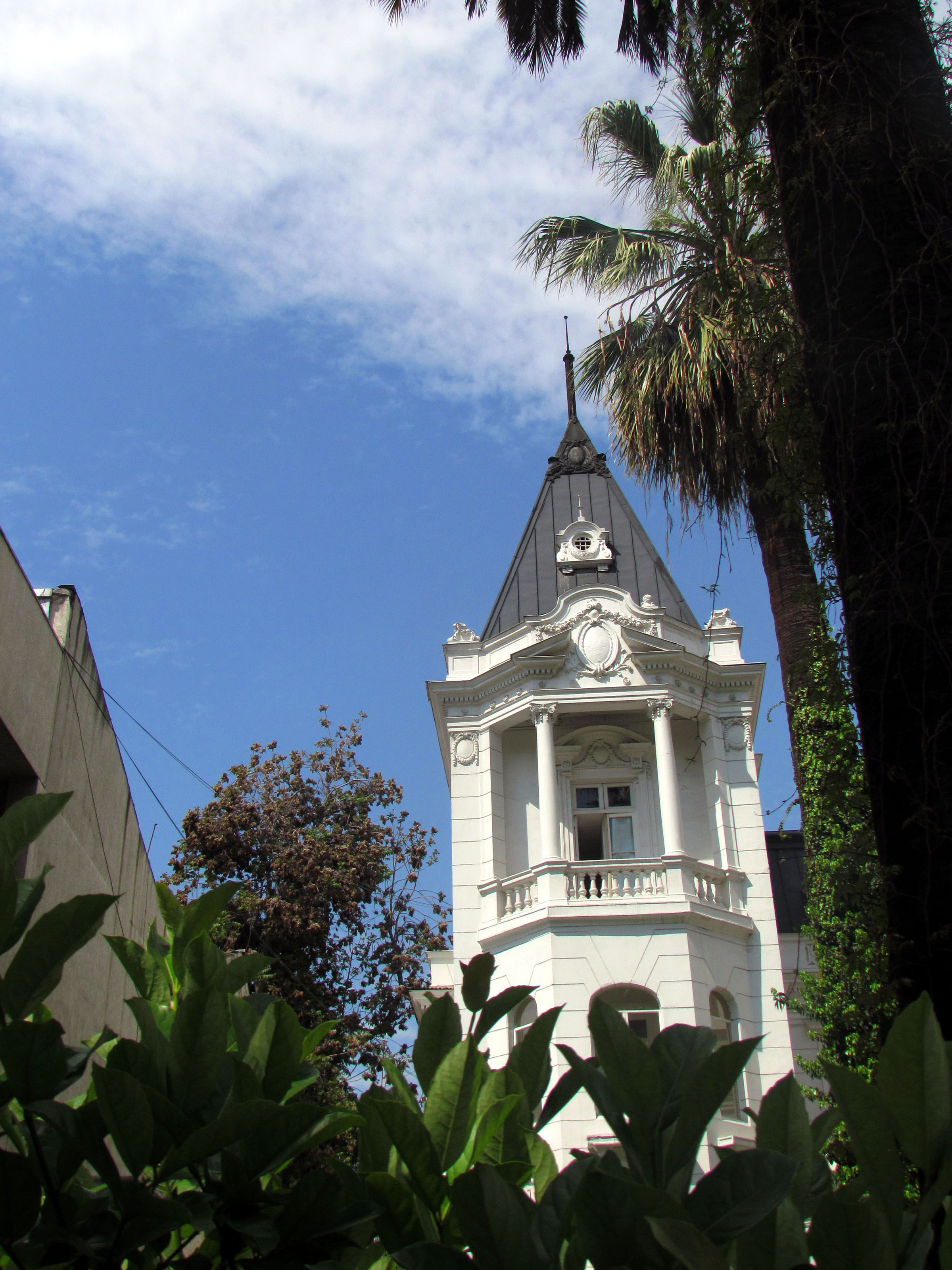 Barrio Bustamante